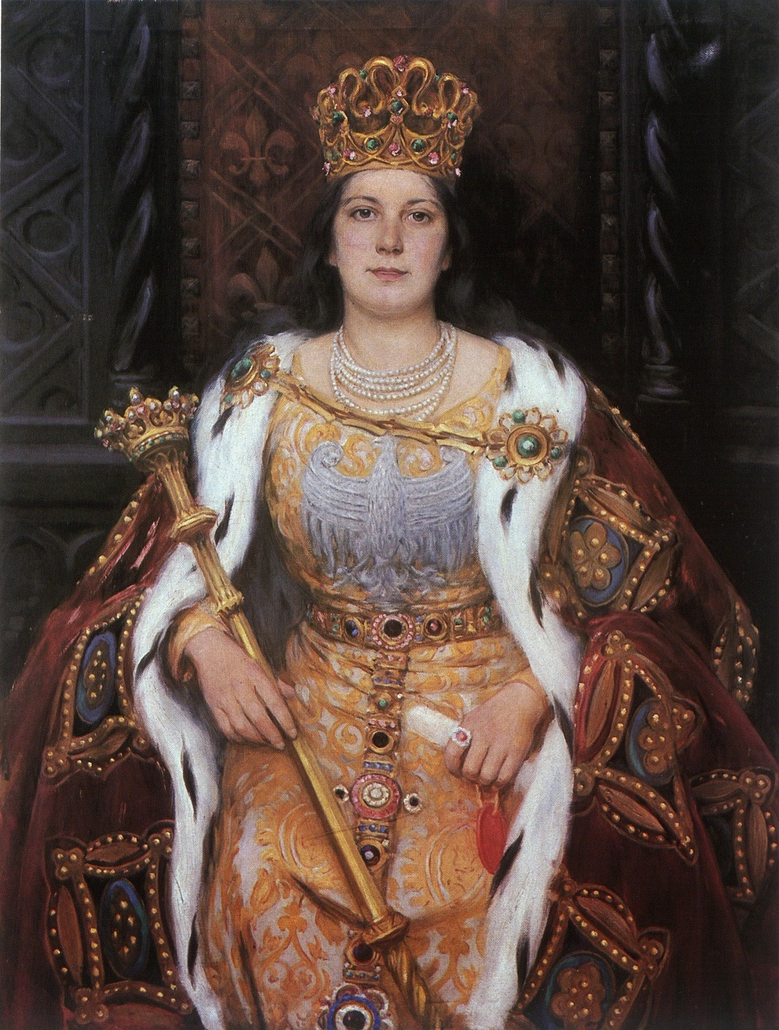 Królowa Jadwiga Andegaweńska (1373-1399)